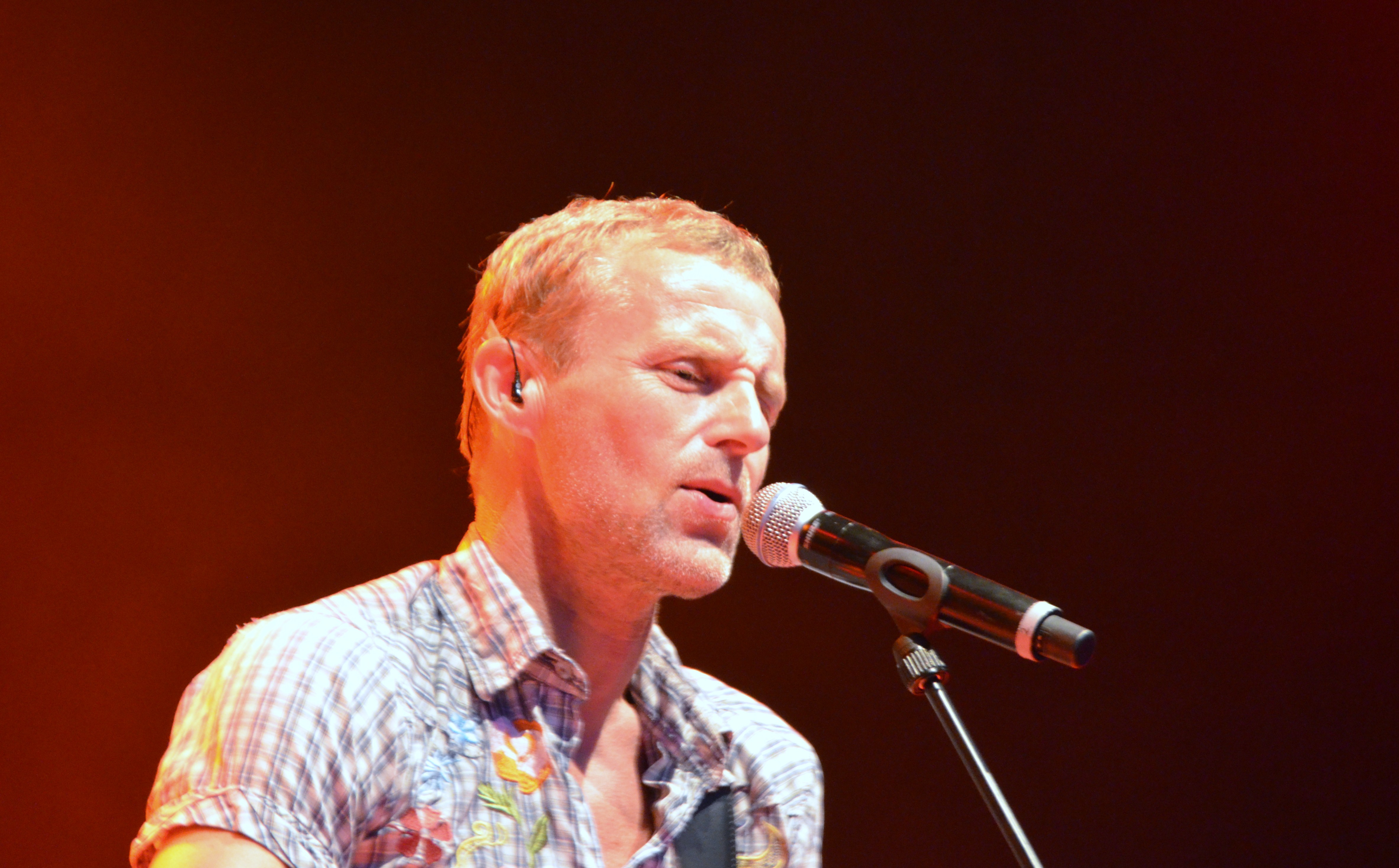 Di Derre (52)